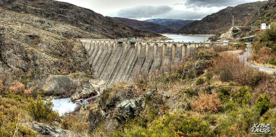 Presa del Embalse de San Sebastián, sobre el río Bibey en el termino de Porto (Sanabria - Zamora - España)